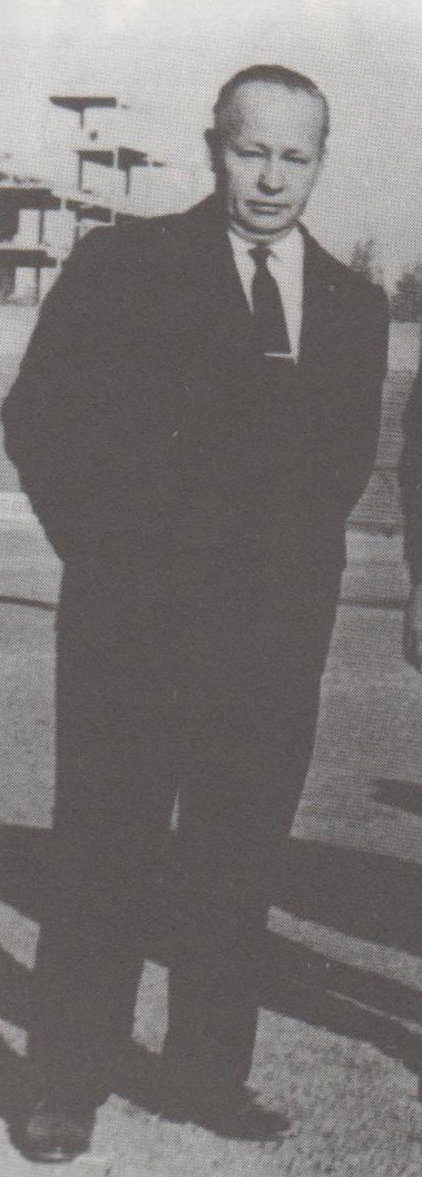 Presidente Boero